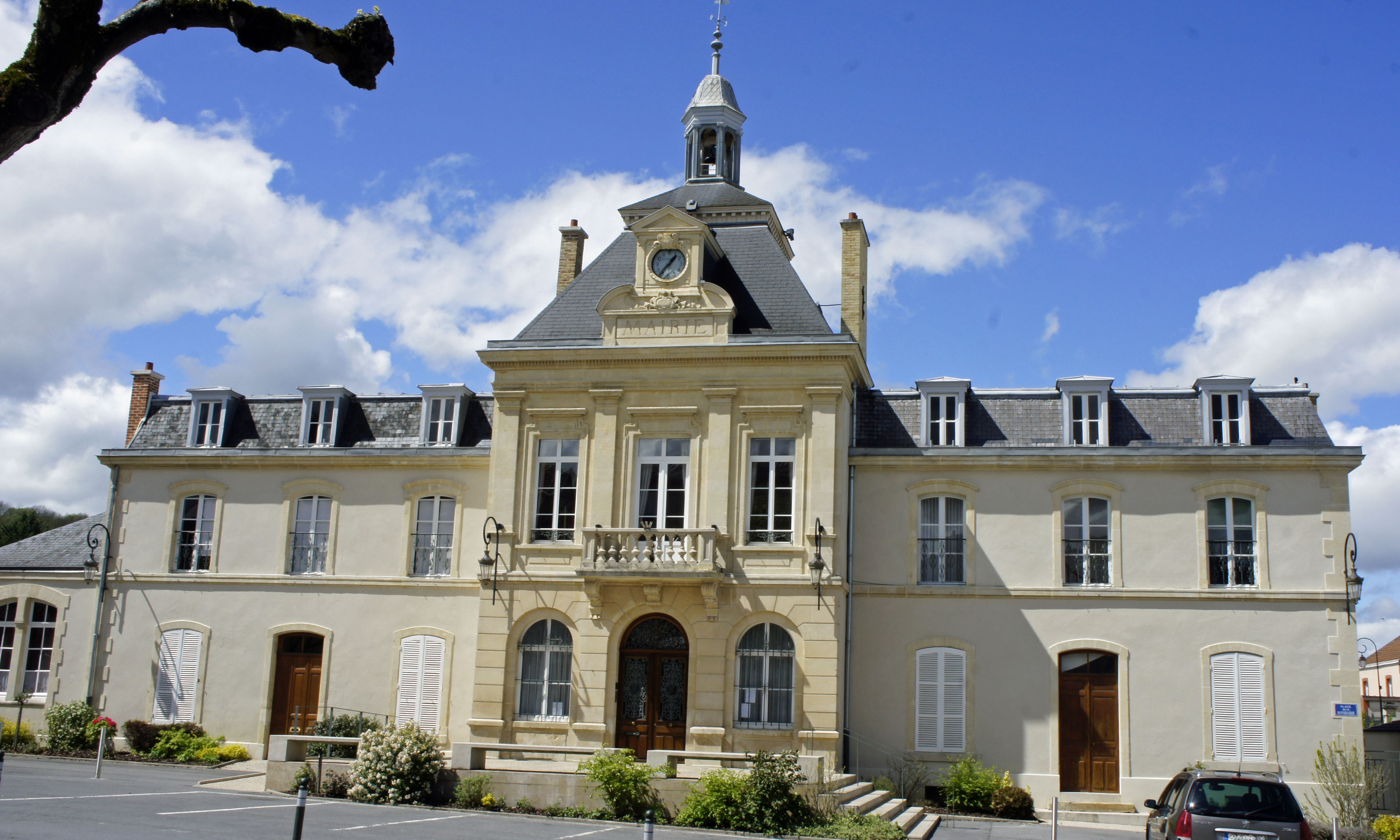 Une vue de l'hôtel de ville de Rilly la montagne et de la place de la république.